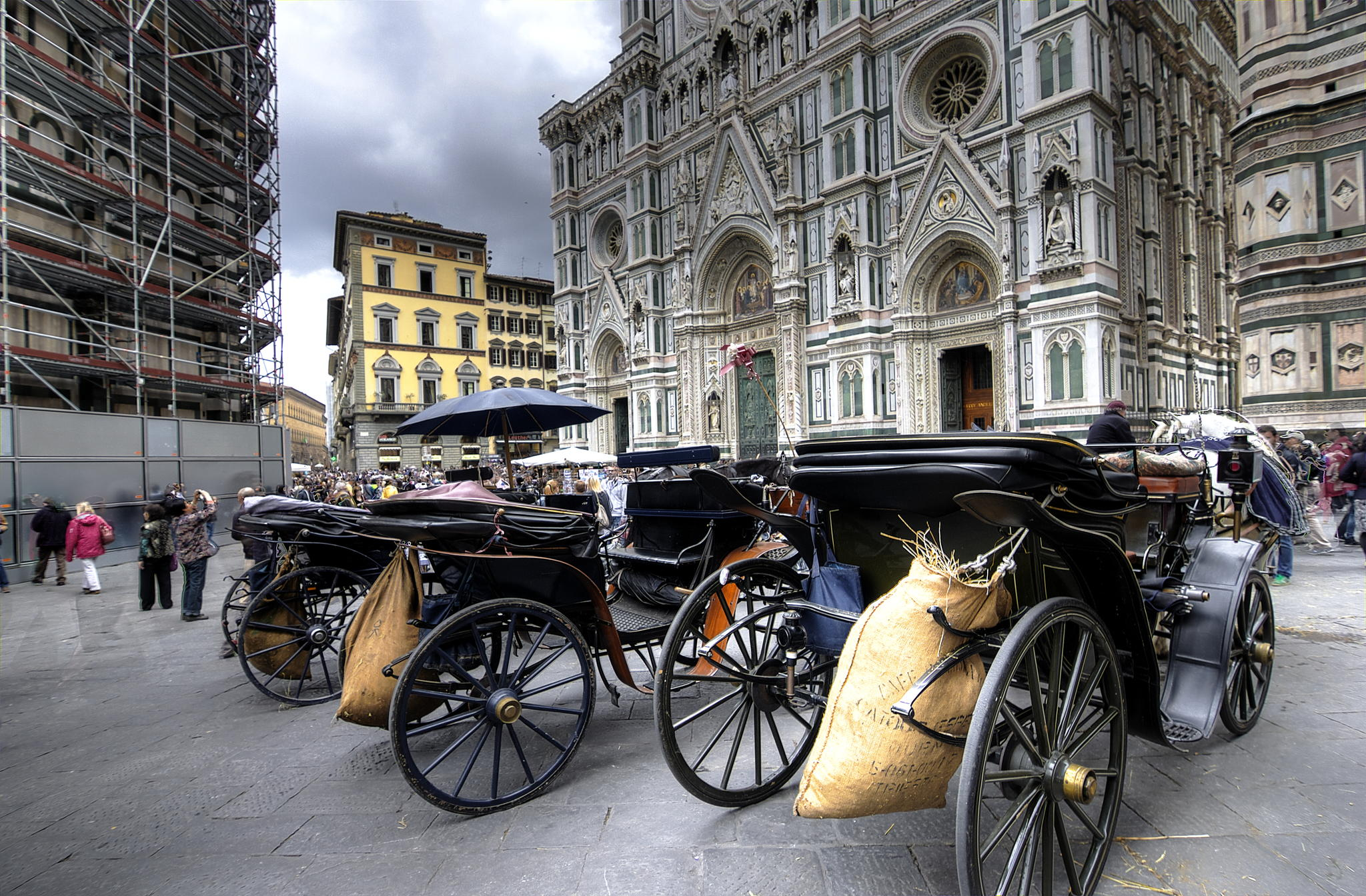 На площади перед собором Санта-Мария-дель-Фьоре